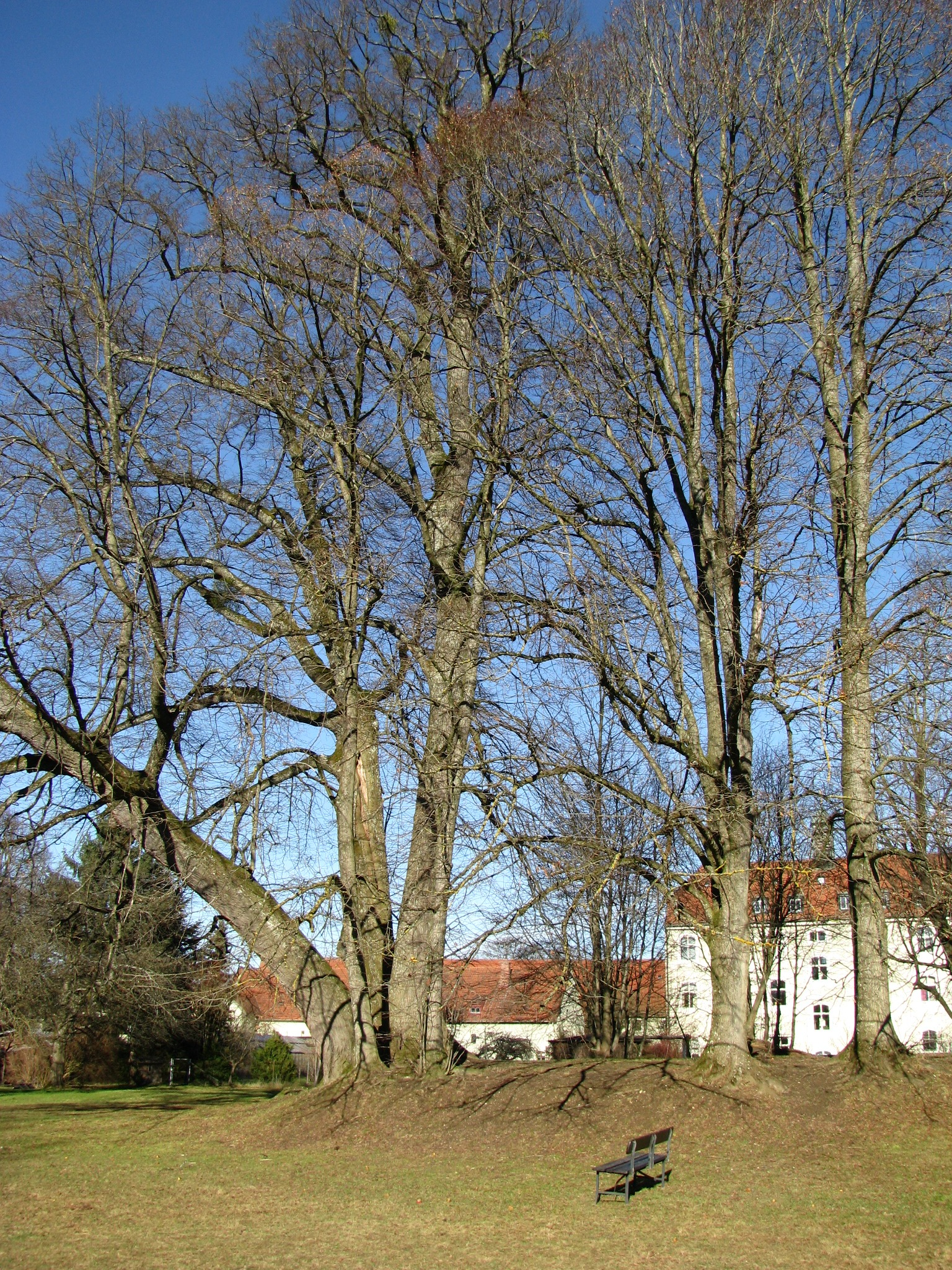 Stelle der ehemaligen Burg Warnberg auf Gut Warnberg und höchster Punkt Münchens mit 580,5 m.